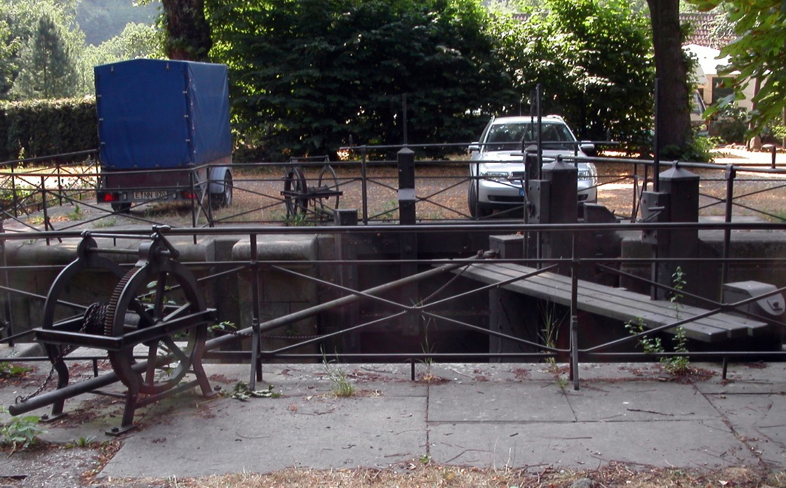 Mechanik der Papiermühlenschleuse in Werden